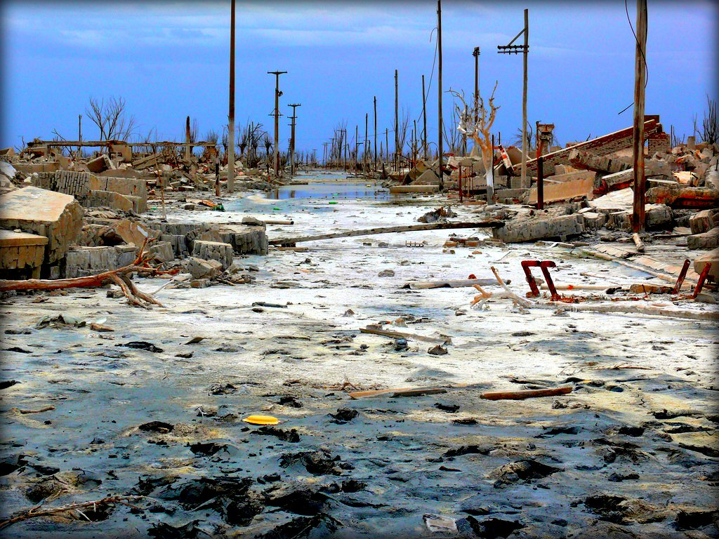 Partido de Adolfo Alsina, Provincia de Buenos Aires